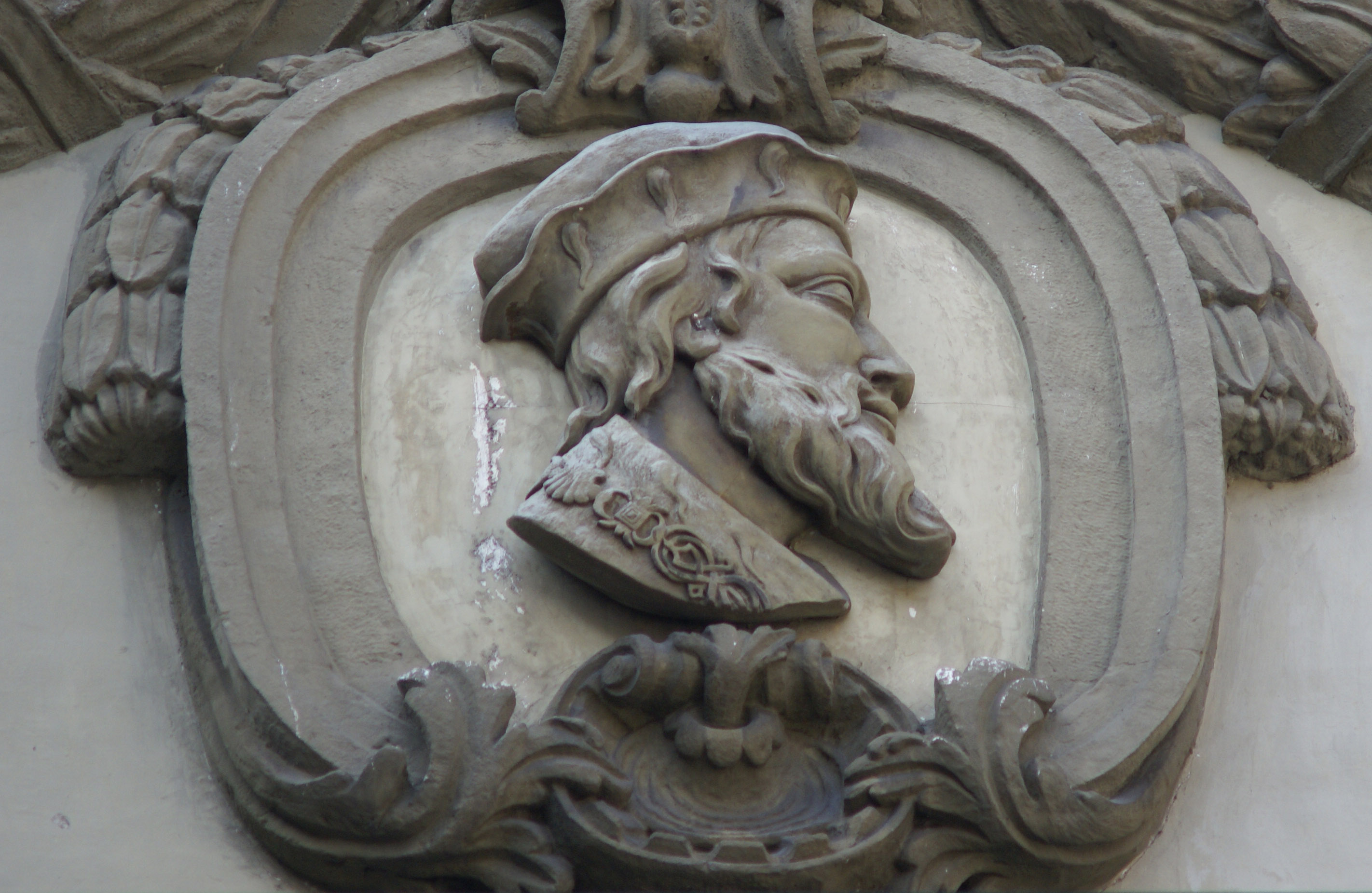 Zytglogge tower in Bern, Switzerland. Profile of Duke Berchtold V of Zähringen.